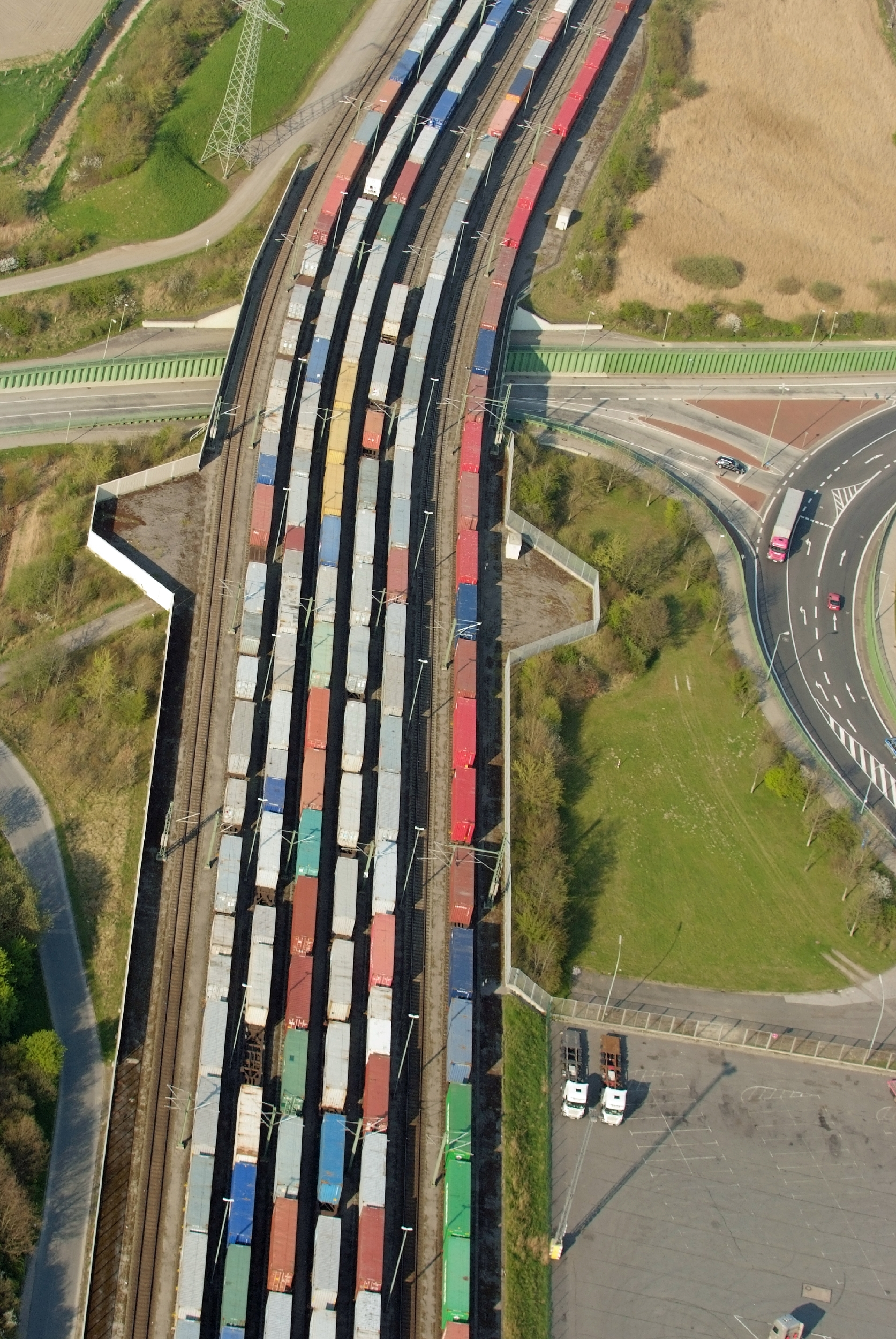 Güterzüge in Bremerhaven / Fotoflug von Nordholz-Spieka nach Oldenburg und Papenburg